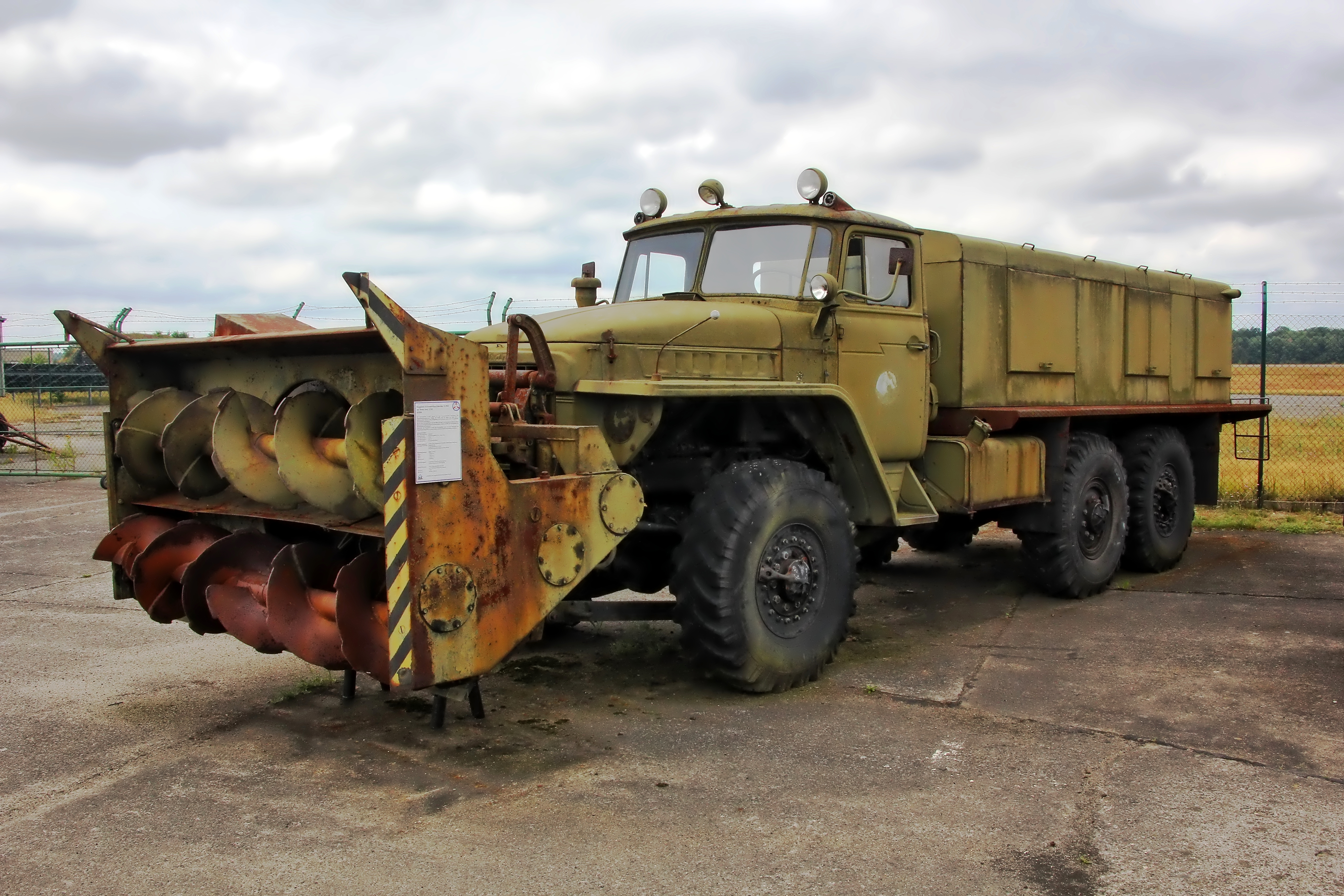 Schneefräse D-902 auf Ural-375E im Luftfahrttechnischen Museum Rothenburg, Seitenansicht.